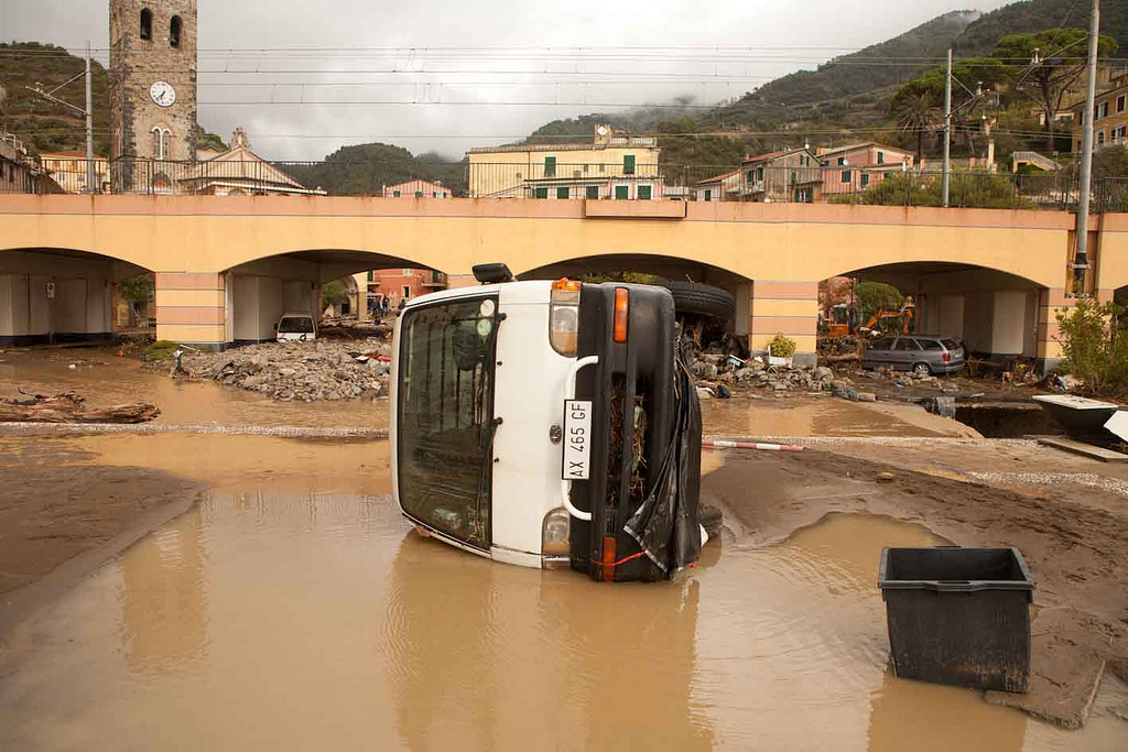 Alluvione del 25 ottobre 2011, Monterosso al Mare, Liguria,, Italy